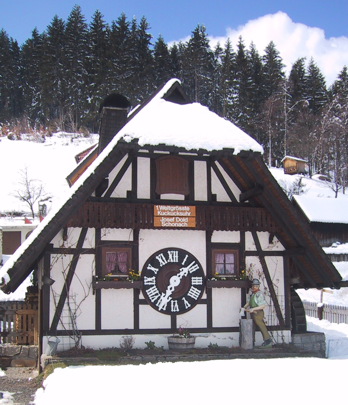 Kuckucksuhr im Maßstab 50:1 in Schonach im Schwarzwald Description: Coockoo clock scale 50:1 in Schonach, Black Forest, Germany Source: self taken picture Fotograf/Picture by: Siegfried Wessler Datum/Date: 11. April 2006